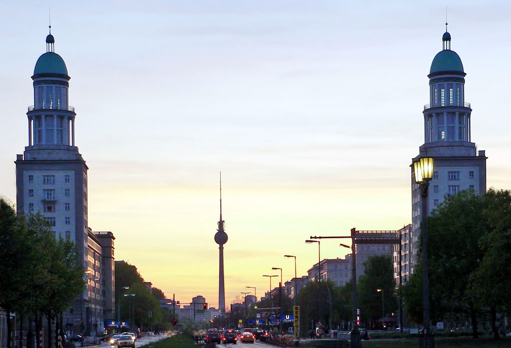 Das Frankfurter Tor mit seinen Zwillingstürmen zur Karl-Marx-Allee in Berlin.